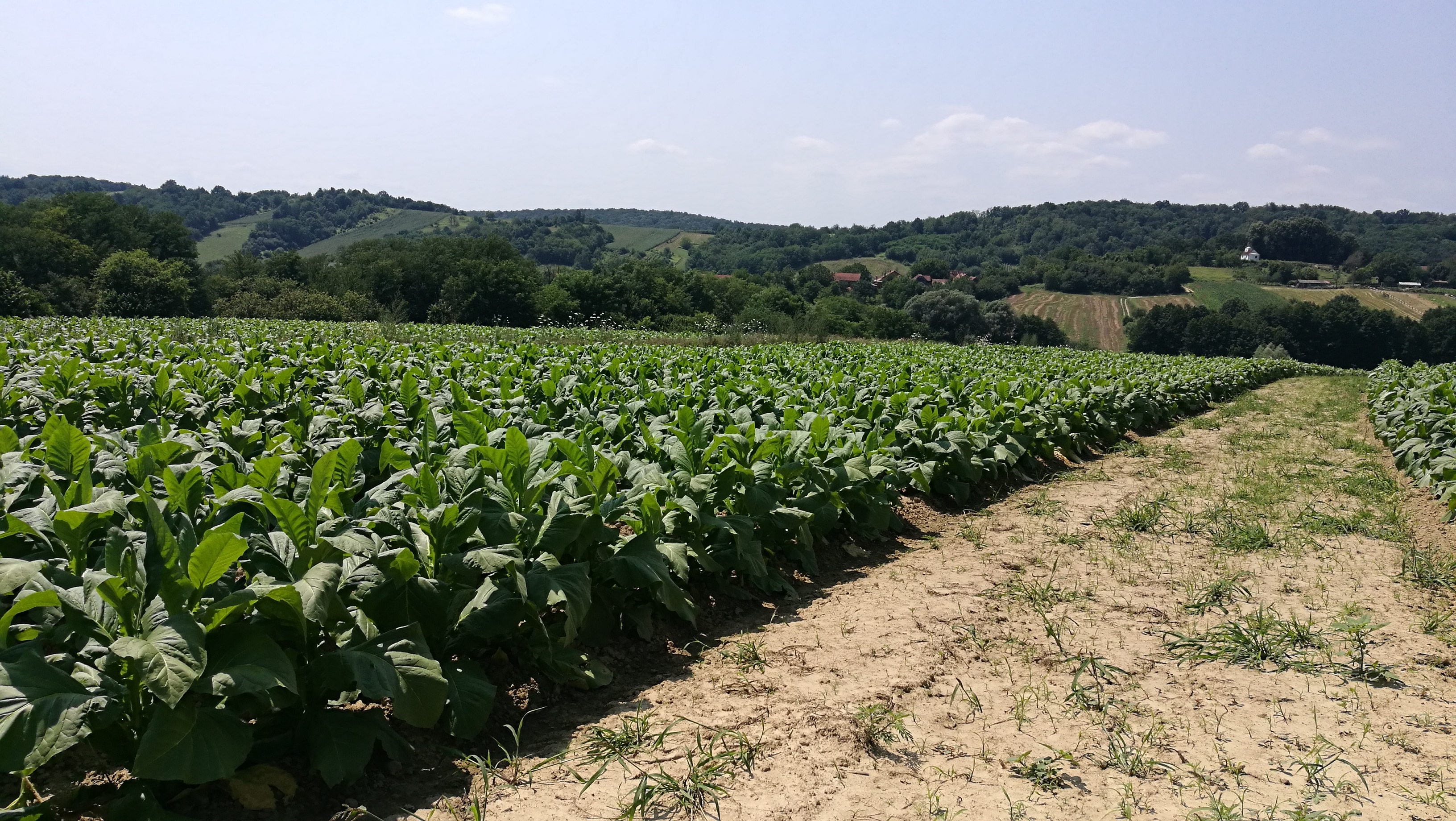 Duhan u Ribnjačkoj u fazi rasta